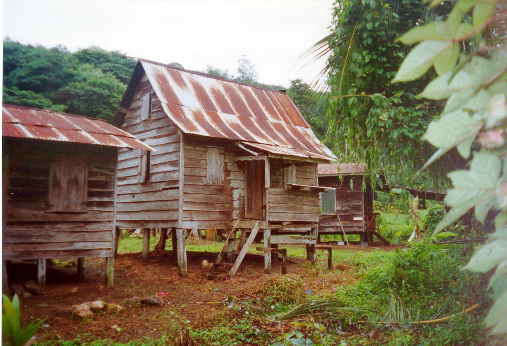 (huis op de oude plantage Berg en Dal, eigen foto beschikbaar gesteld voor publiek domein, foto maart 2002) Bild:BergiHaus.jpg